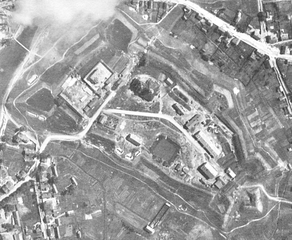 Предвоенный вид с воздуха на Великолукскую крепость (фрагмент снимка Люфтваффе)